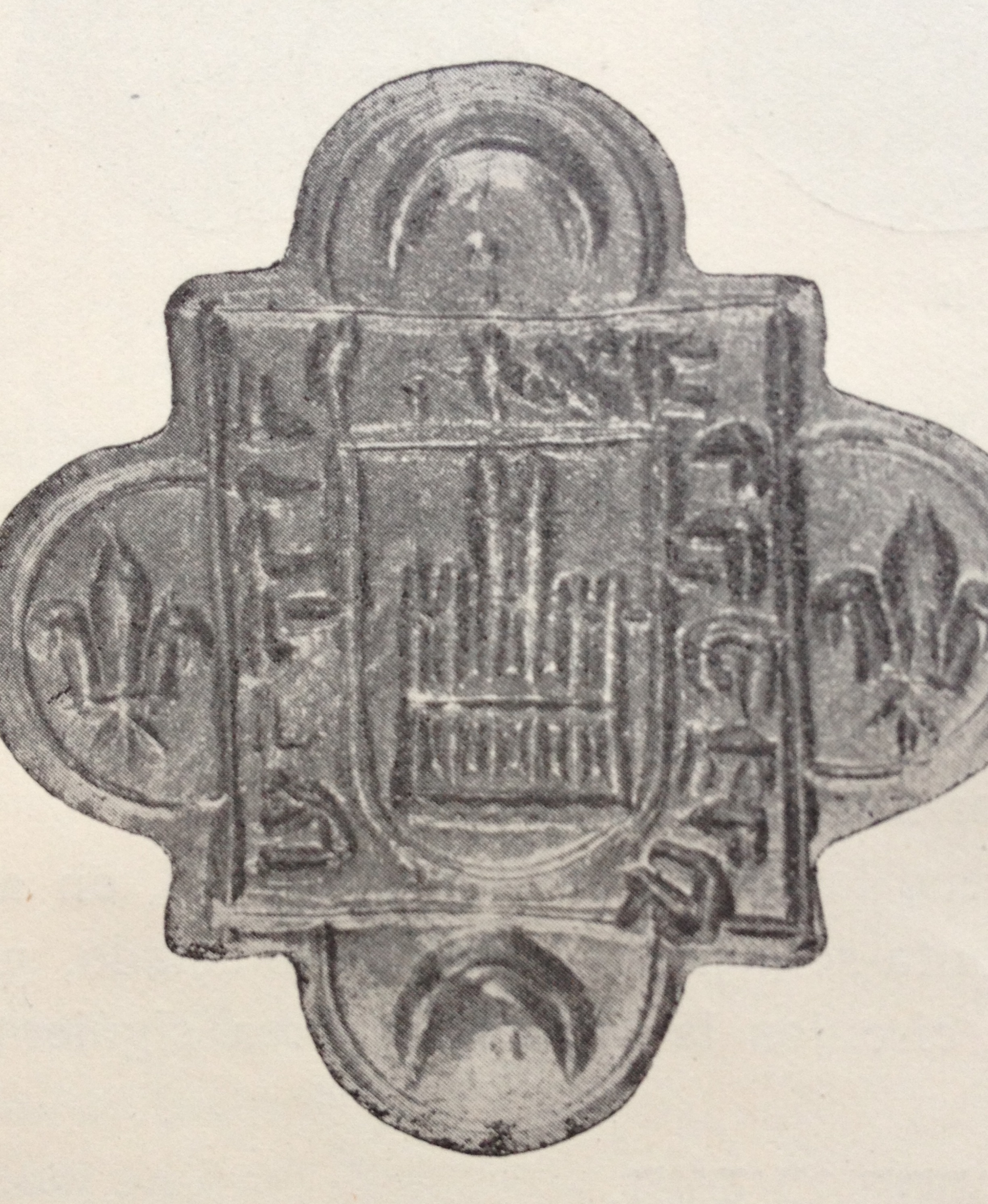 Sello de bronce de 16 mms., descubierto en Toro (Zamora) en el año 1953, al derribar un tapial contiguo a la mansión del señor Barón de Covadonga, D. José Valdés. Consérvalo este. Bibilografía F. Cantera: Sellos hispanohebreos, en Sefarad, XIII, 1153, págs. 106-107, con facsímil, y Nueva observación sobre los sellos hispanohebreos, ibid., págs.. 355, con fotografía.